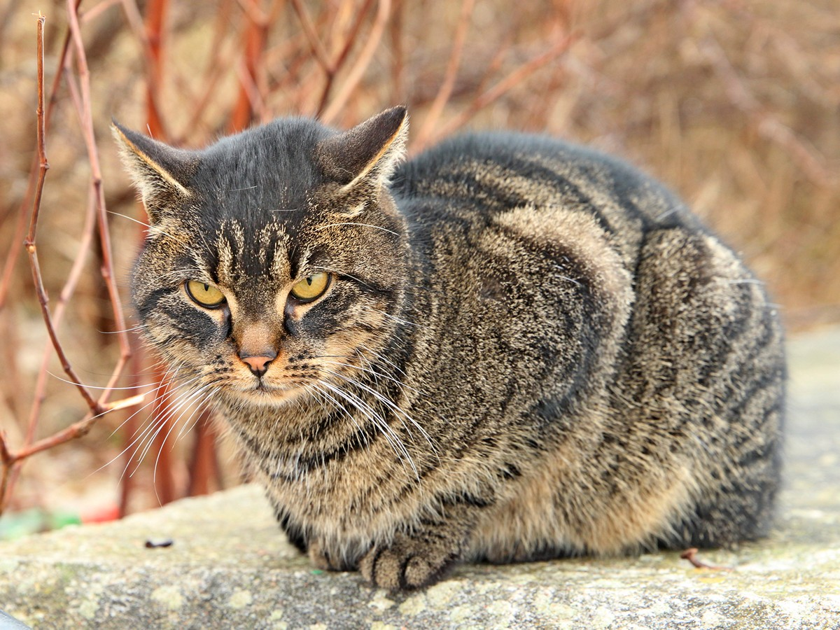 Klassische Hauskatze in Mecklenburg